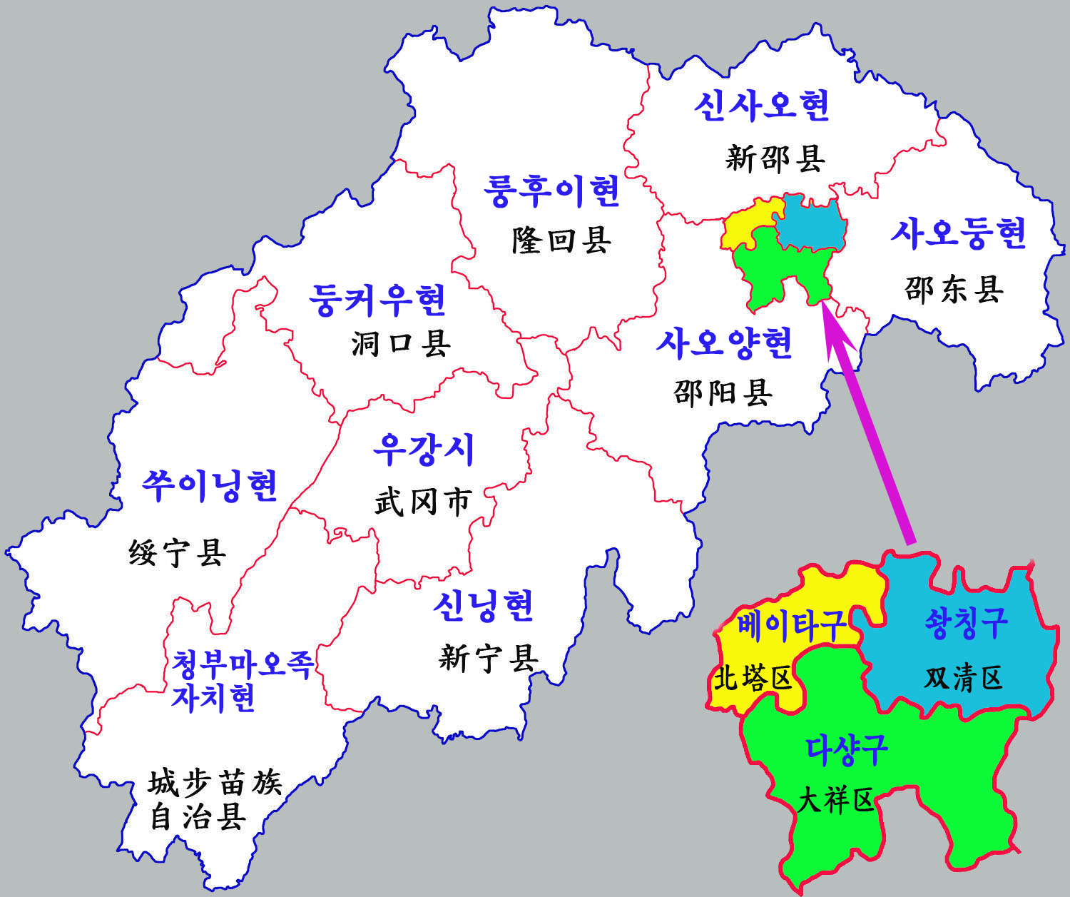 사오양시 현급구역도